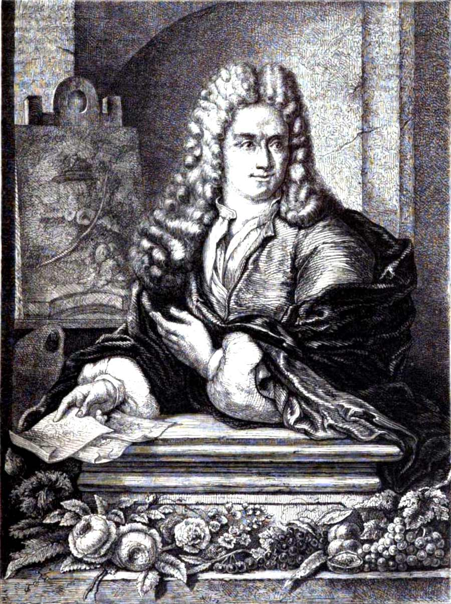 Freeman, after Fontainieu, after Arnoud van Halen, after Arnold Boonen